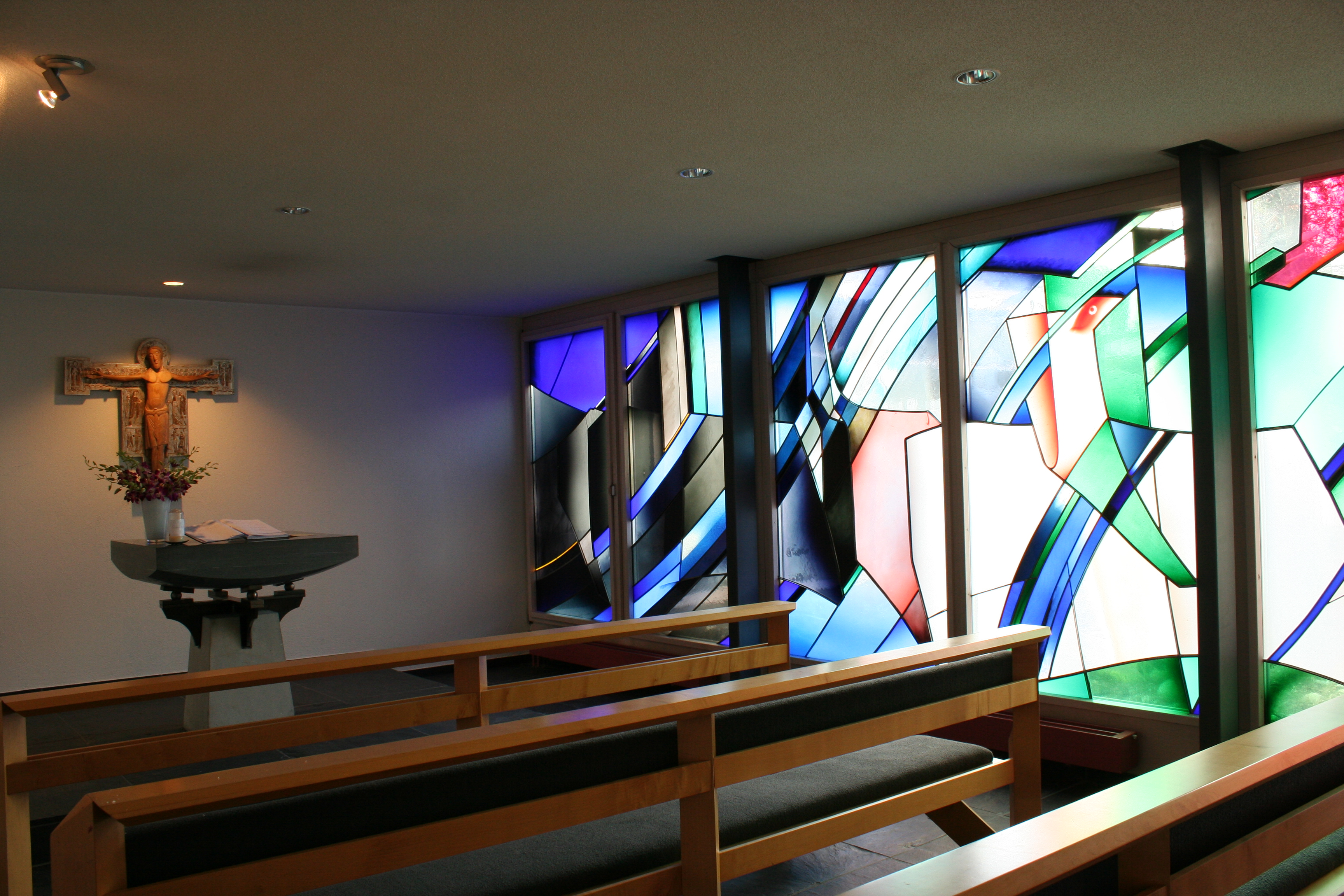 Römisch-katholische Kirche St. Katharina von Siena Fällanden, Kapelle